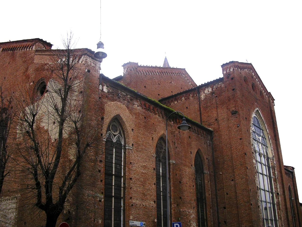 Pisa, Toscana, ItaliaSan Francesco in Pisa